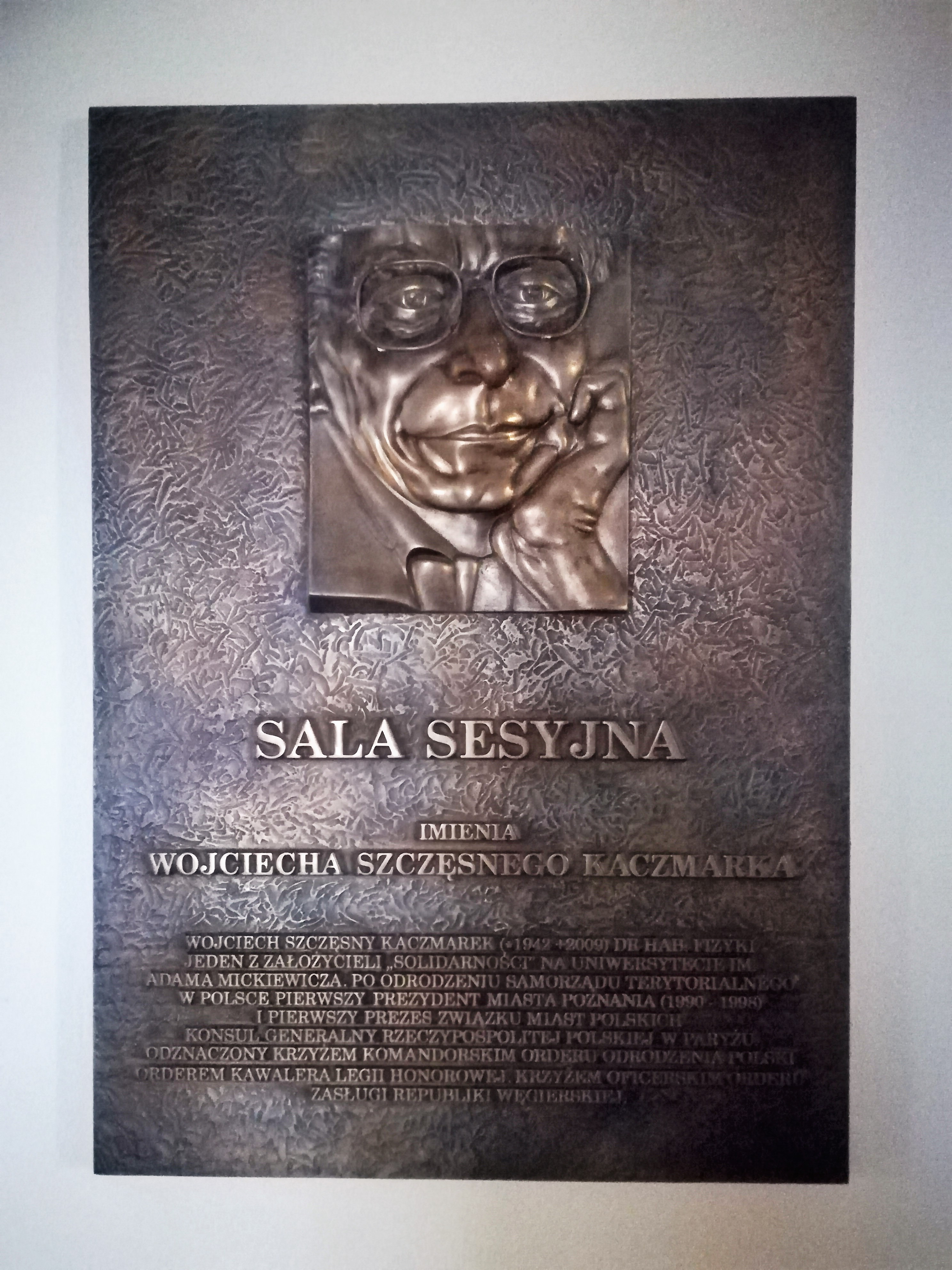 Sala sesyjna im. Wojciecha Szczęsnego Kaczmarka w UM w Poznaniu.